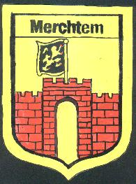 Vlag Merchtem.